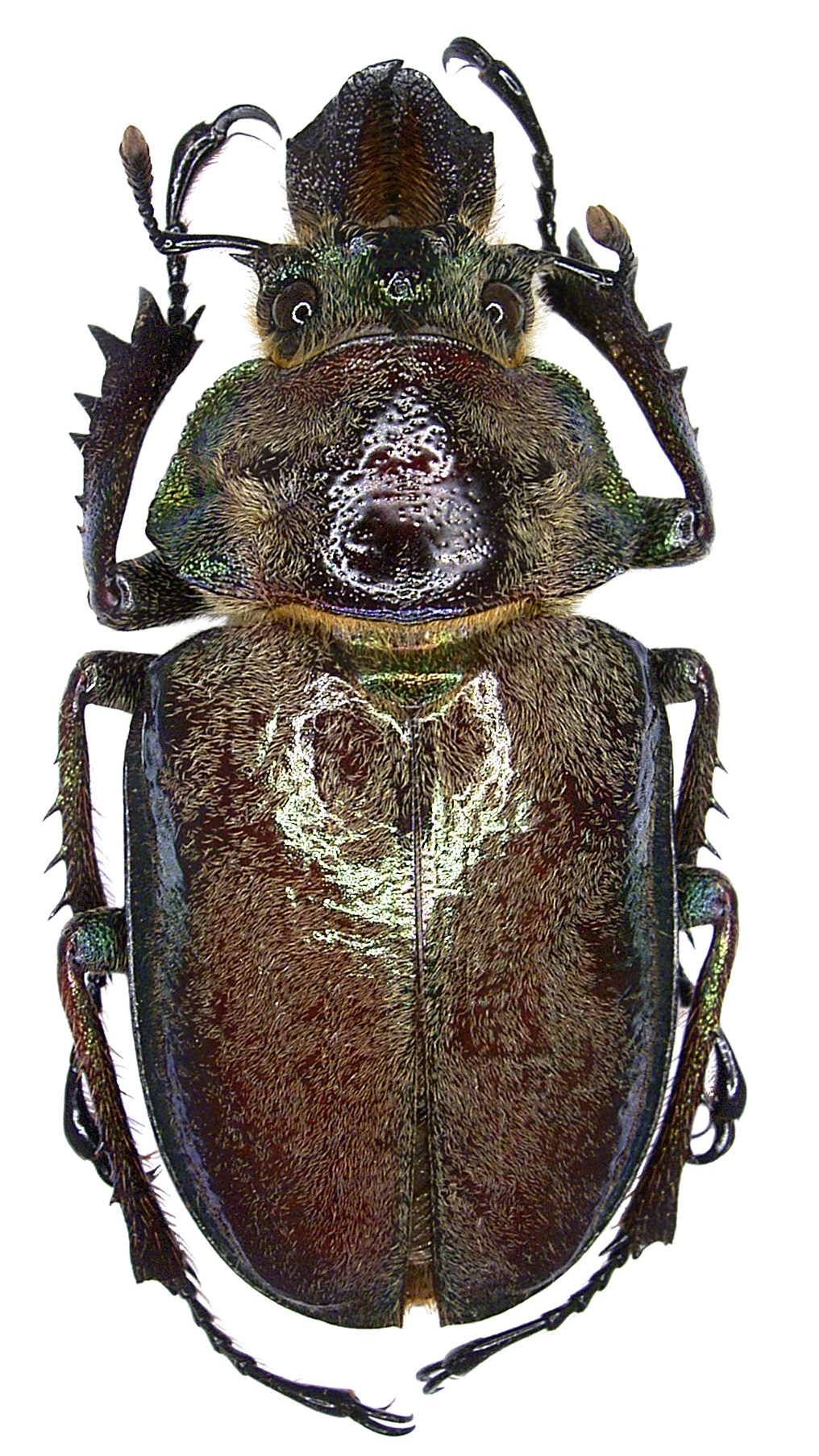 Familie: Lucanidae Grösse: 51-76,4 mm Verbreitung: Kolumbien, Venezuela, Ekuador, Peru, Bolivien Fundort: Peru, an Pedro, Manu-Park leg. 1998; det. U.Schmidt Foto: U.Schmidt, 2006